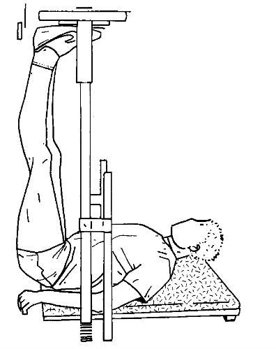 Musculation exercice squats couché 2.png